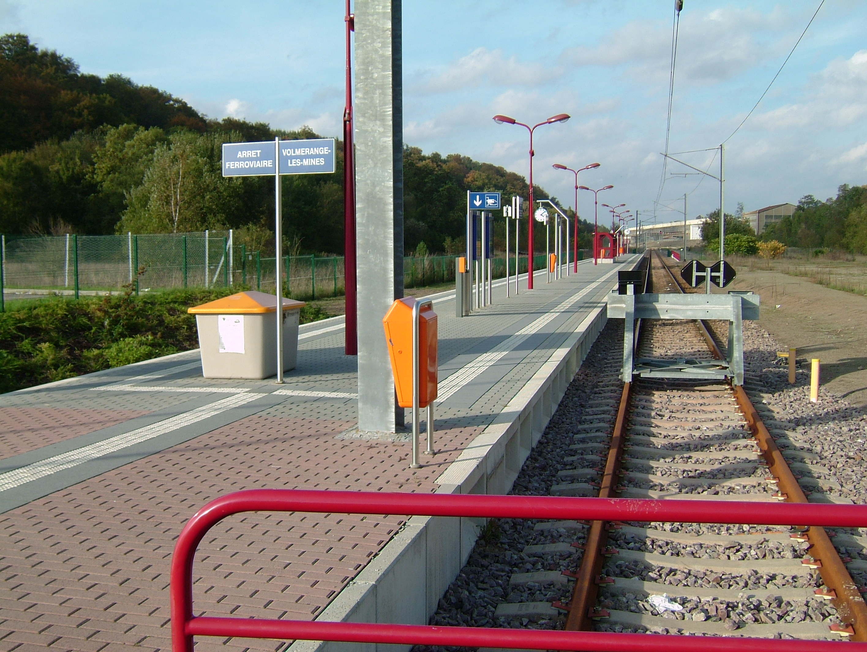 CFL-Statioun Wuelmereng